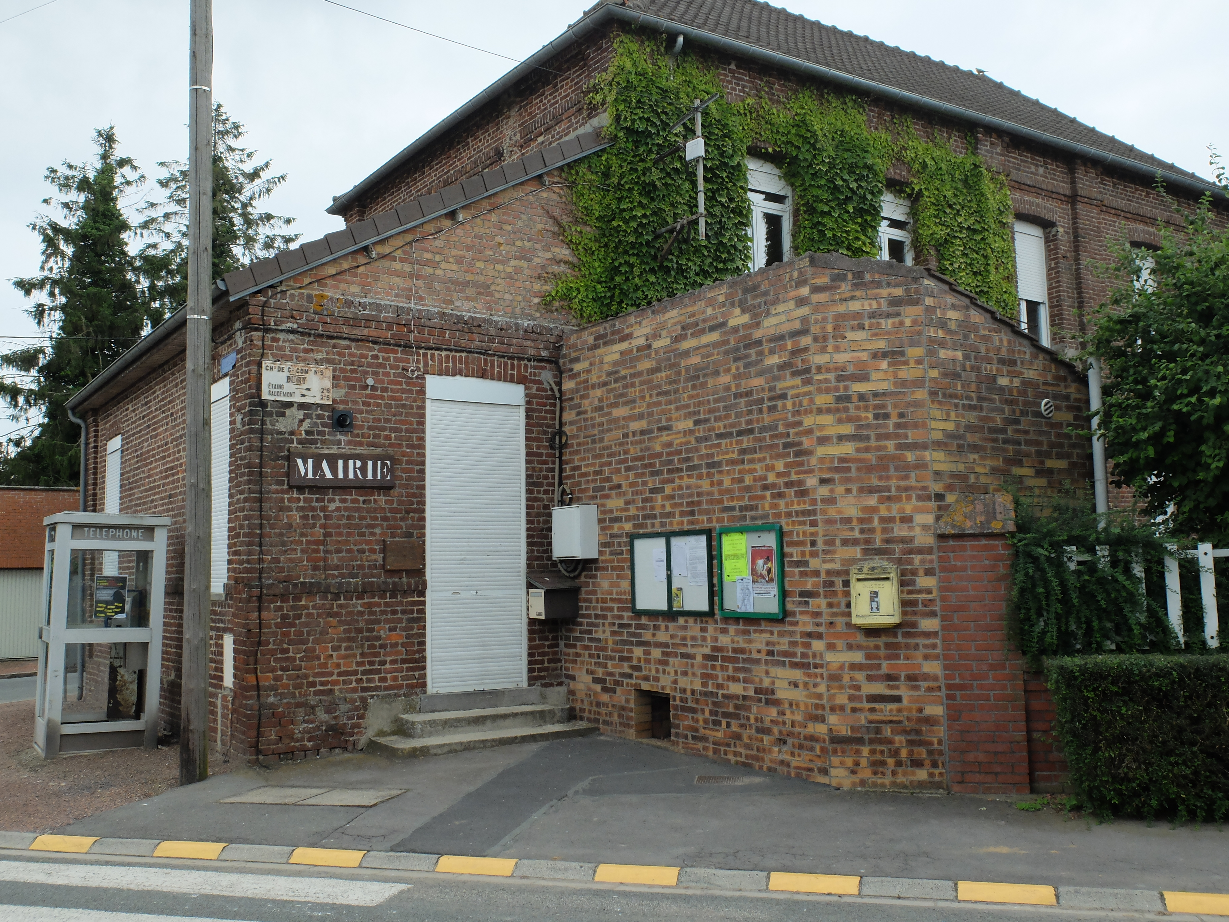 Vue de la mairie de Dury (Pas-de-Calais).